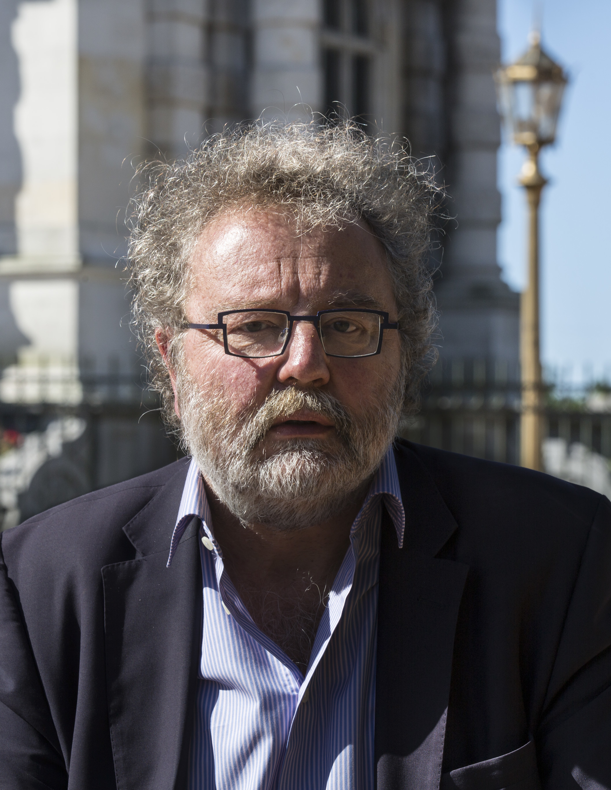 Buenos Aires, 18 de noviembre de 2016 - El periodista y escritor británico, John Carlin.